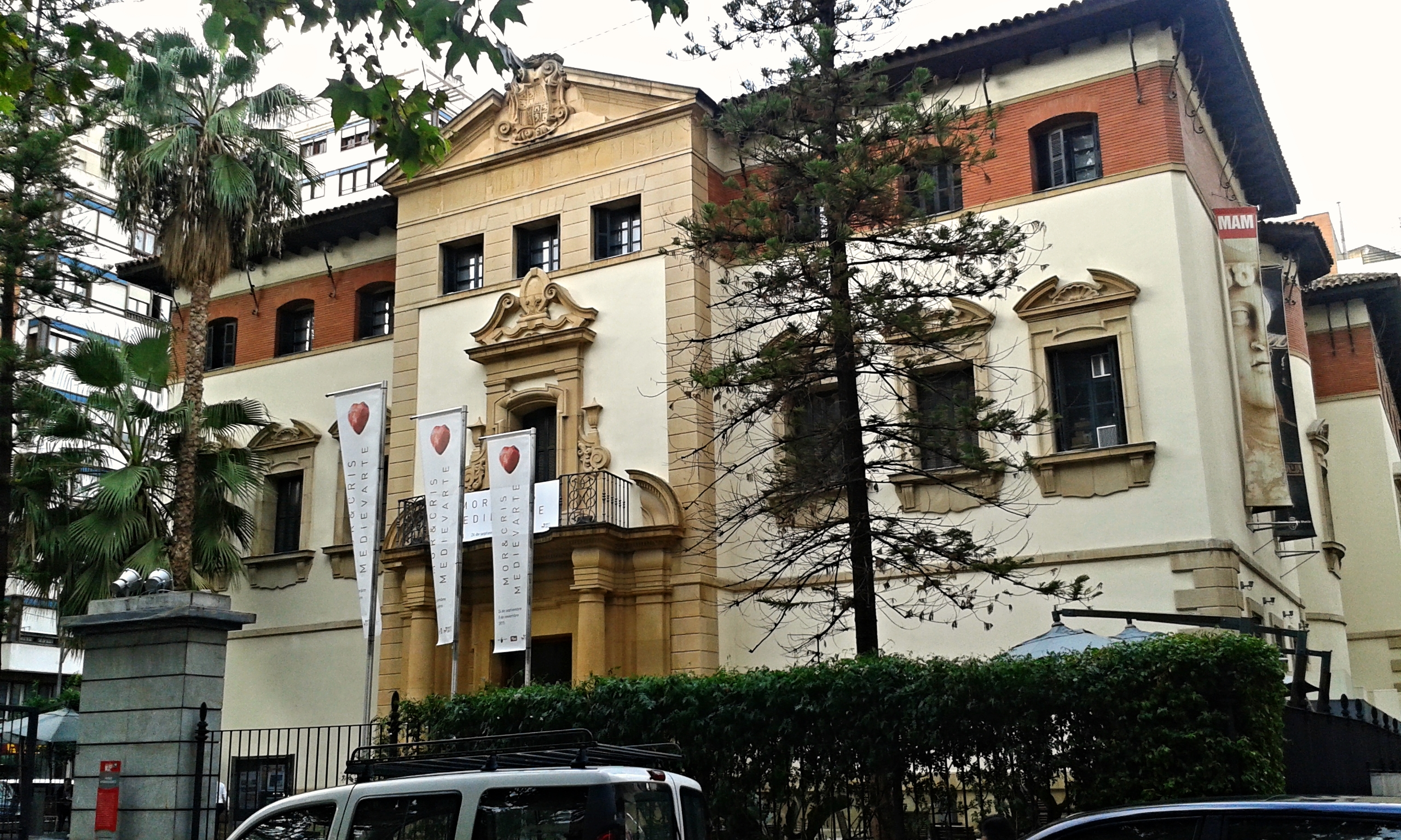 Museo de Arqueología de Murcia